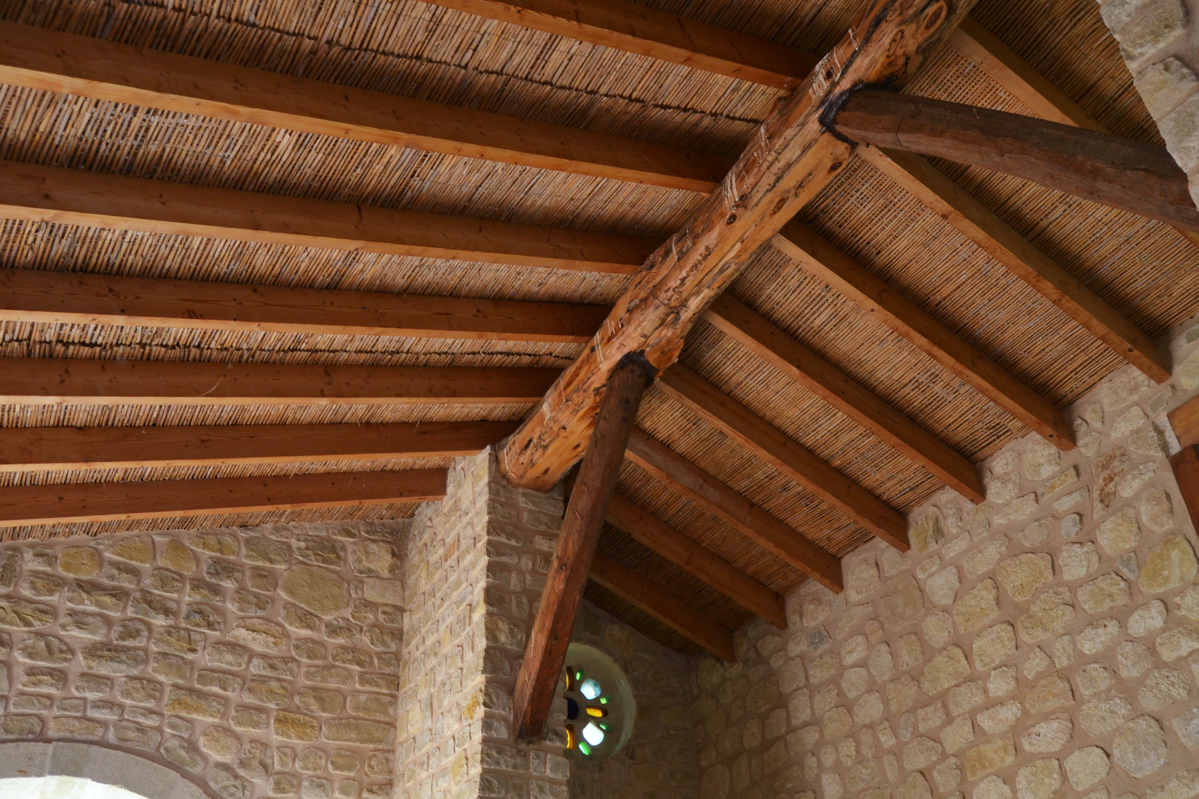 Sostre de l'ermita de la mare de Déu del Carme del cementeri de Benilloba.